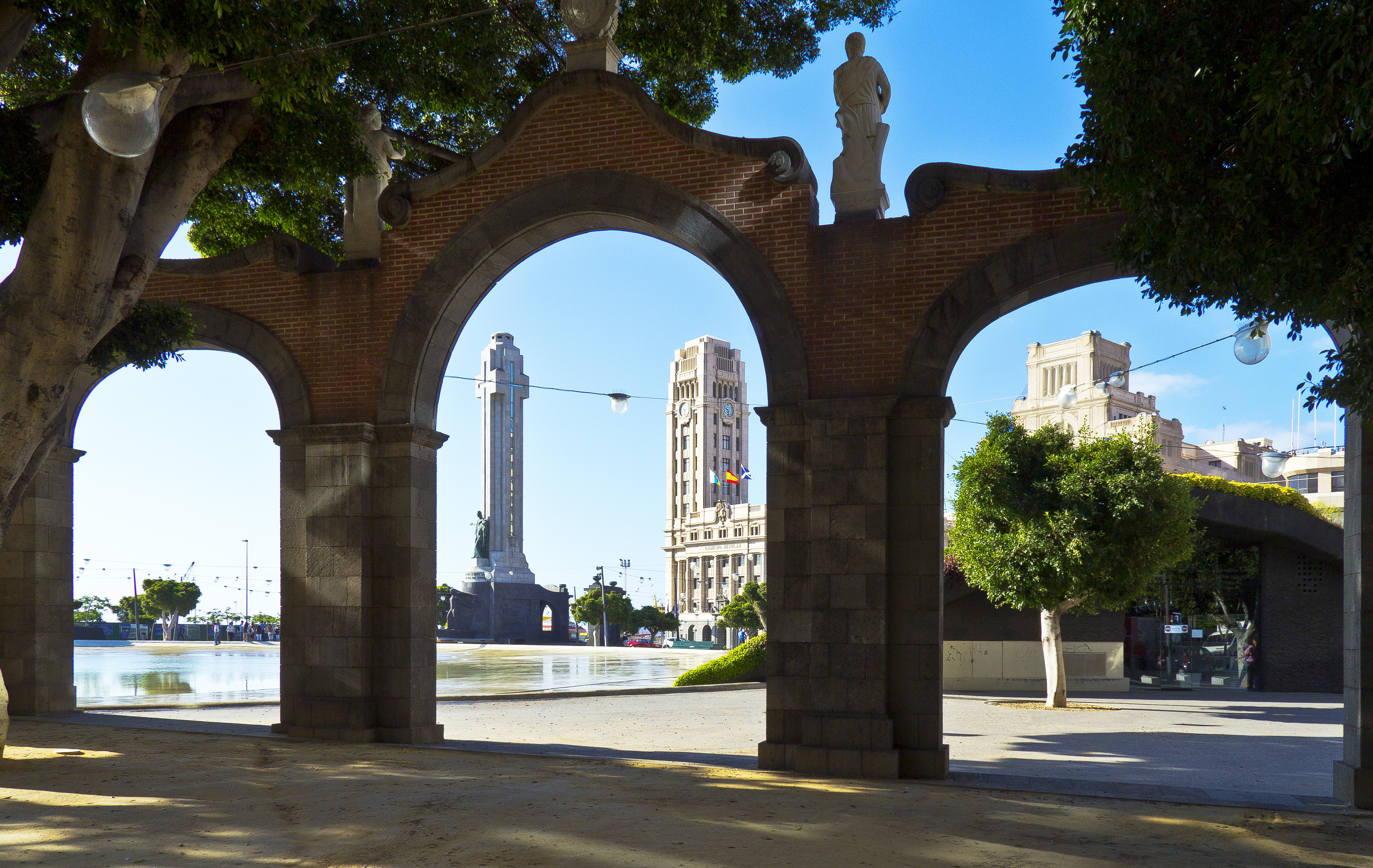 Blick durch die Torbögen des Eingangs der Alameda del Duque de Santa Elena auf die Plaza de España in Santa Cruz de Tenerife